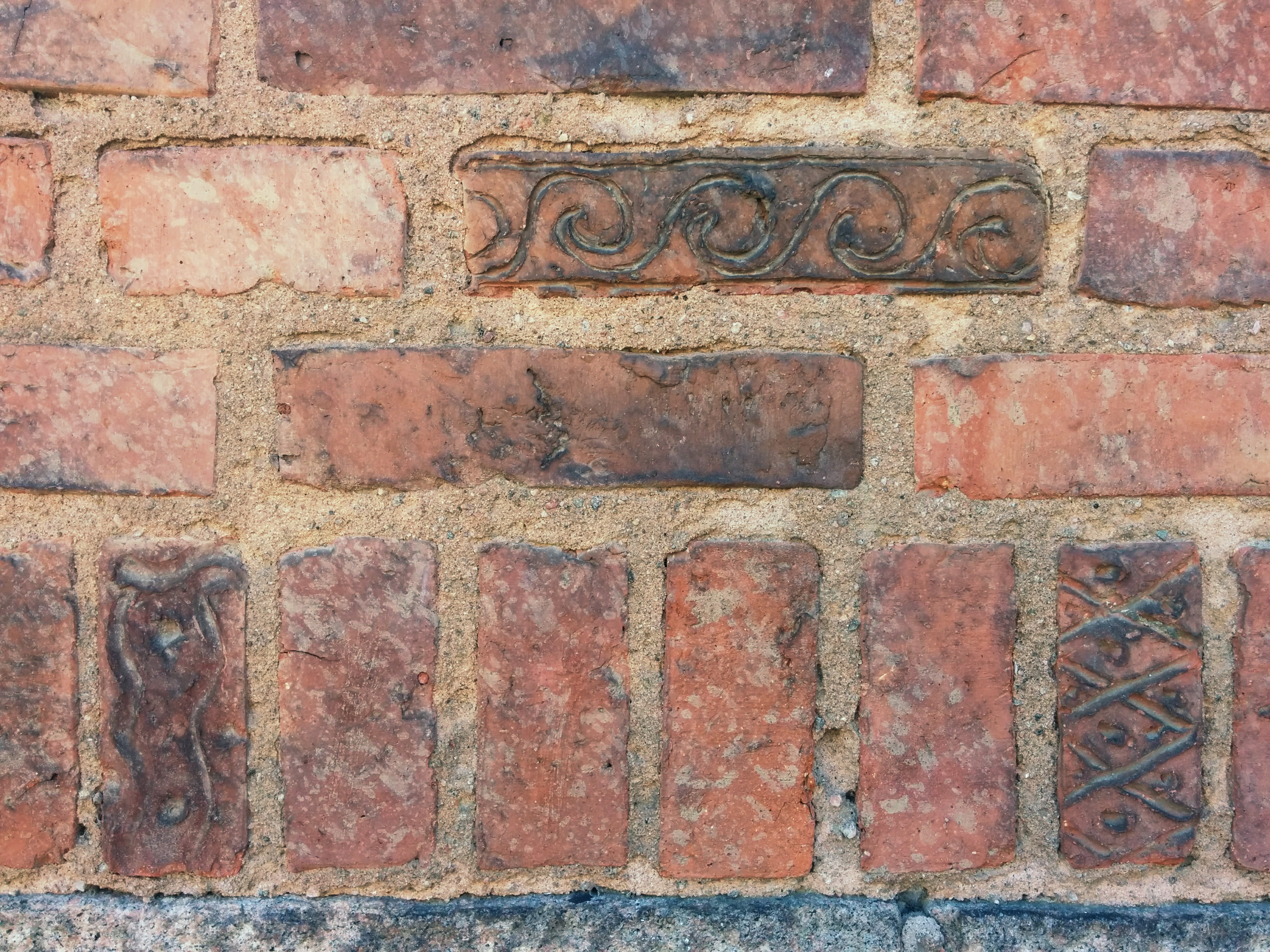 Röhsska museet i Göteborg. Mönstrade tegelstenar i ytterfasaden.